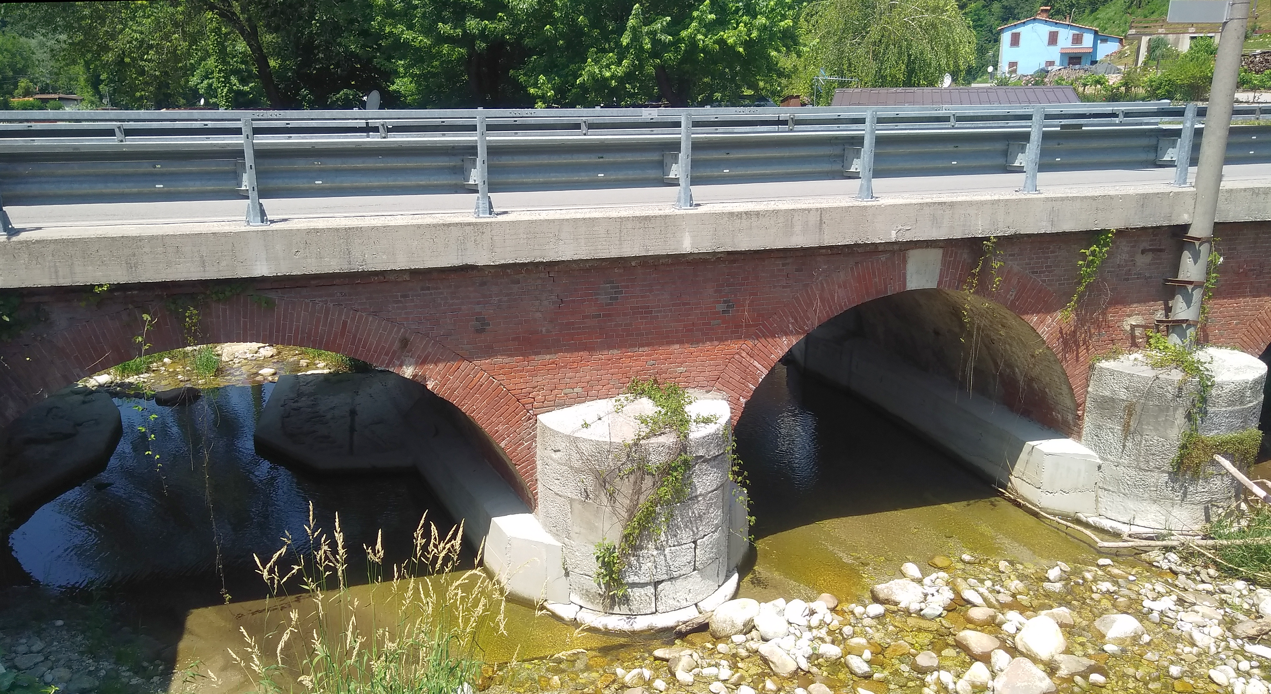 Torrente Maudagna: il ponte sulla provinciale a Riosecco